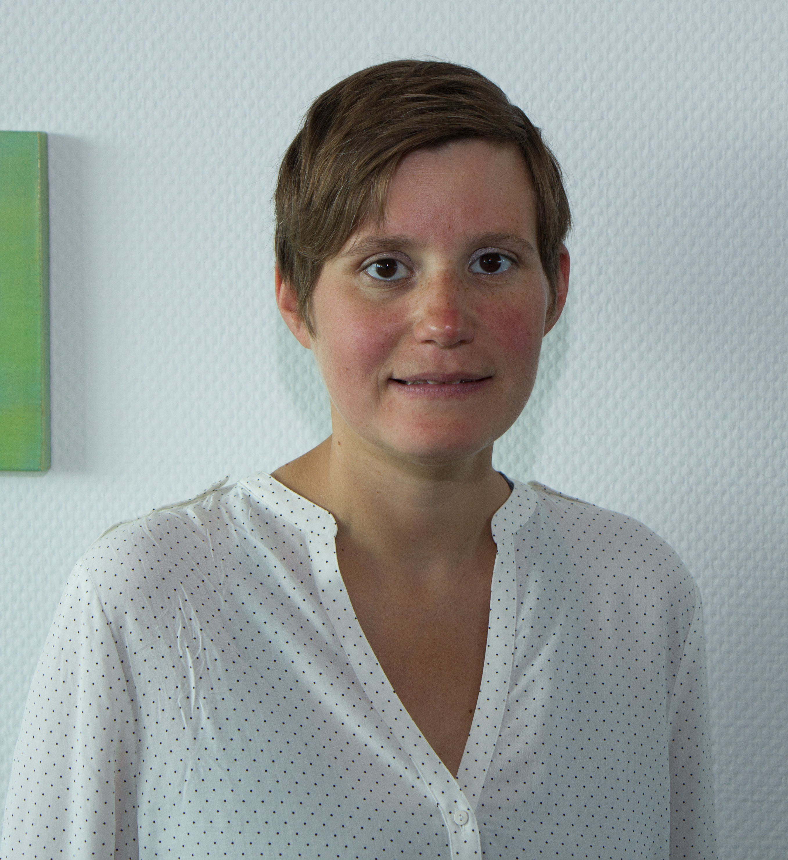 Julia Unterhinninghofen: Pressekonferenz im rheinland-pfälzischen Ministerium für Wissenschaft, Weiterbildung und Kultur am 7. August 2018 in Mainz.